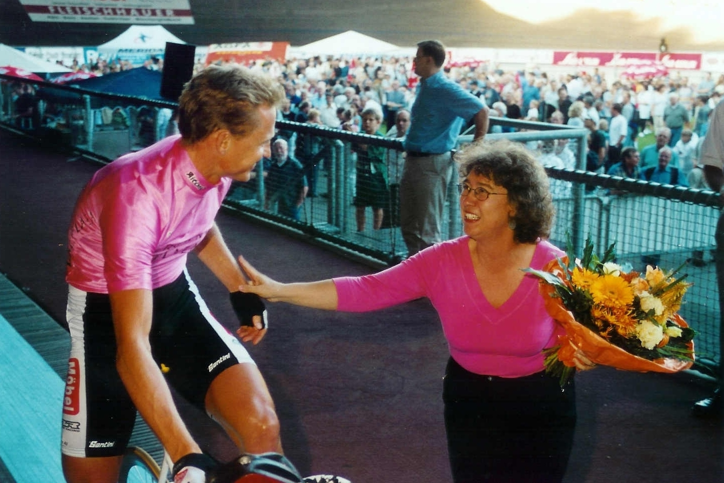 Die deutsche Journalistin Renate Franz mit dem Rennfahrer Kurt Betschart auf der Albert-Richter-Radrennbahn in Köln, anlässlich seines Sieges.